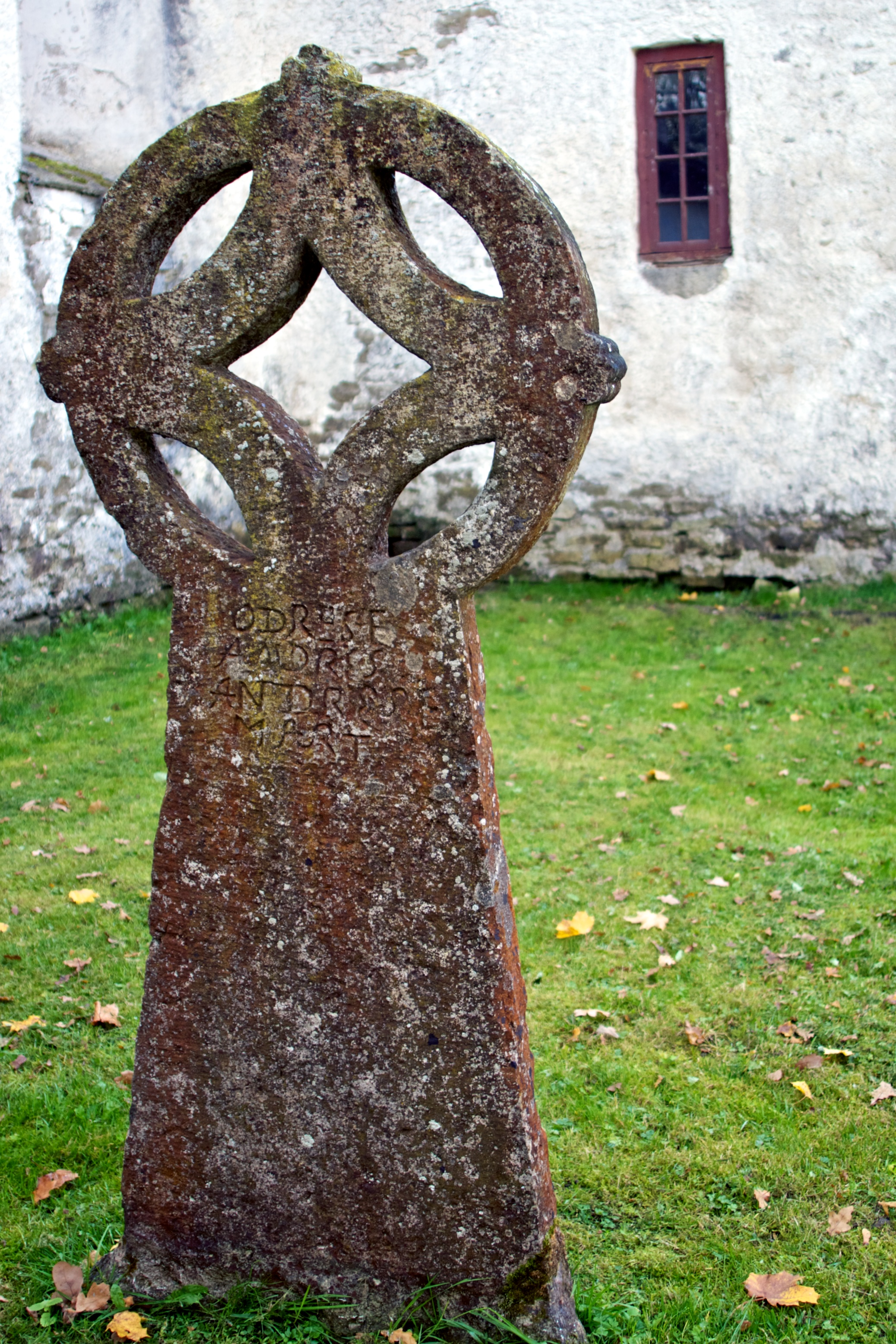 Järva-Peetri ratasrist